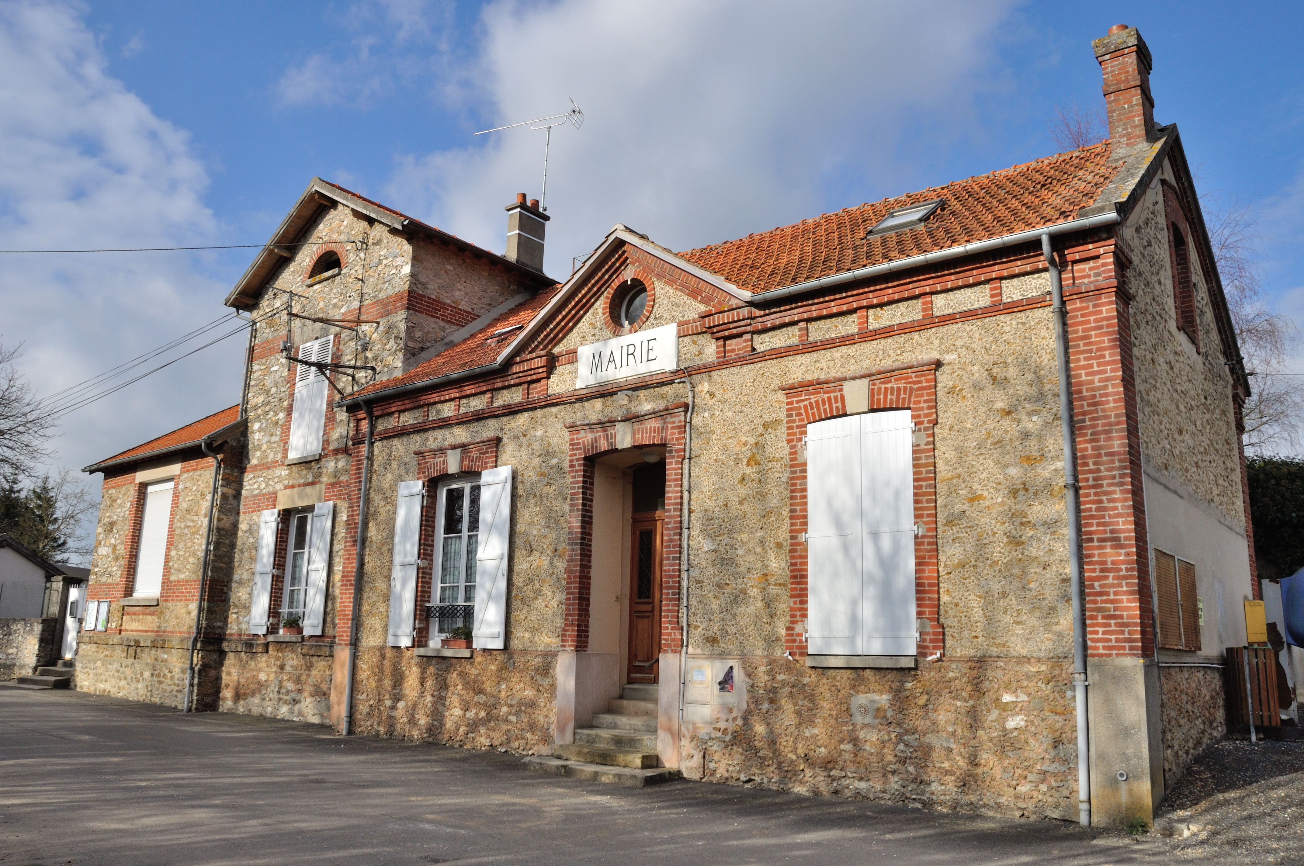 Mairie de Giremoutiers. (Seine-et-Marne, région Île-de-France).